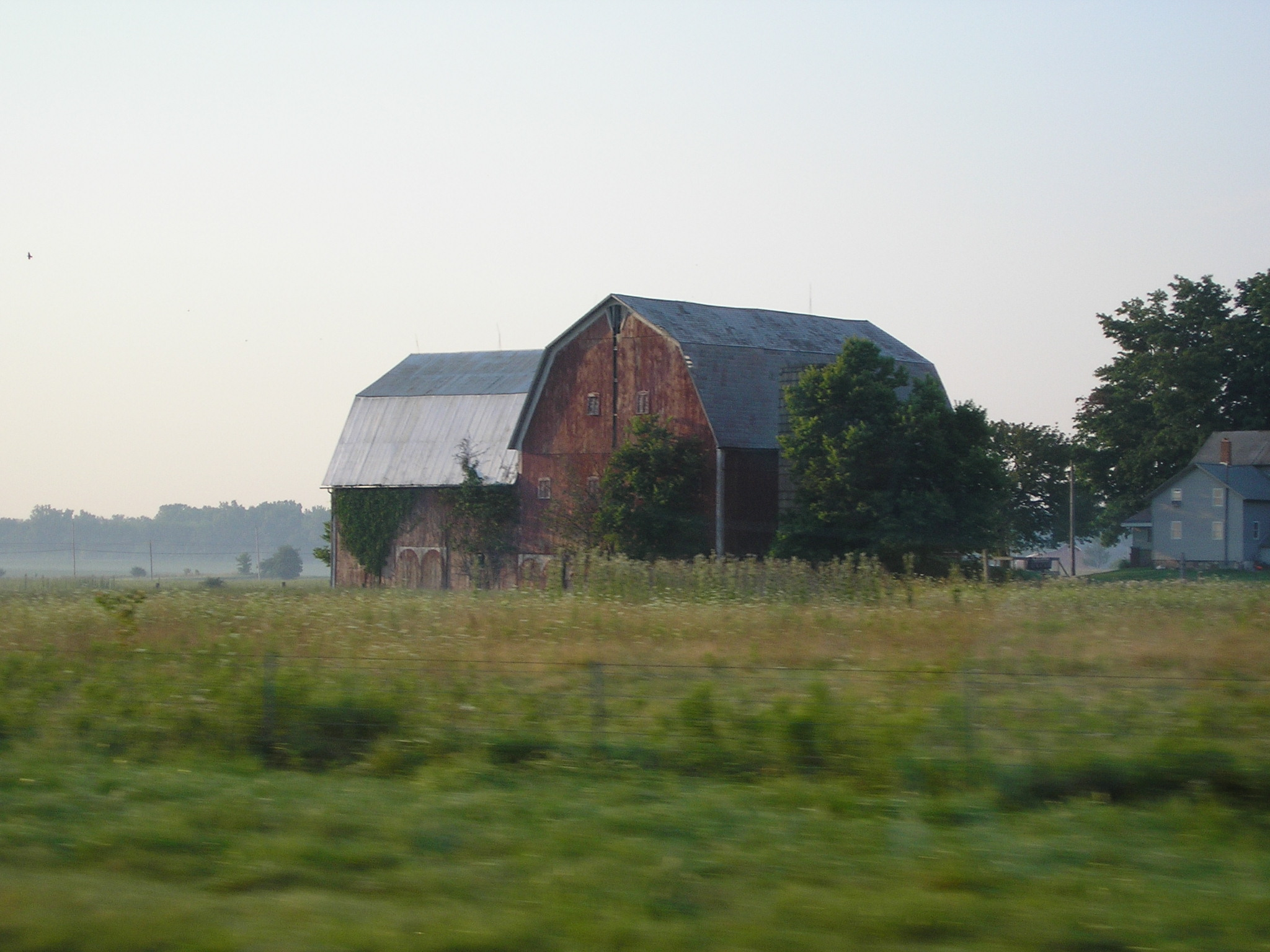 Georgi Banchev 2004